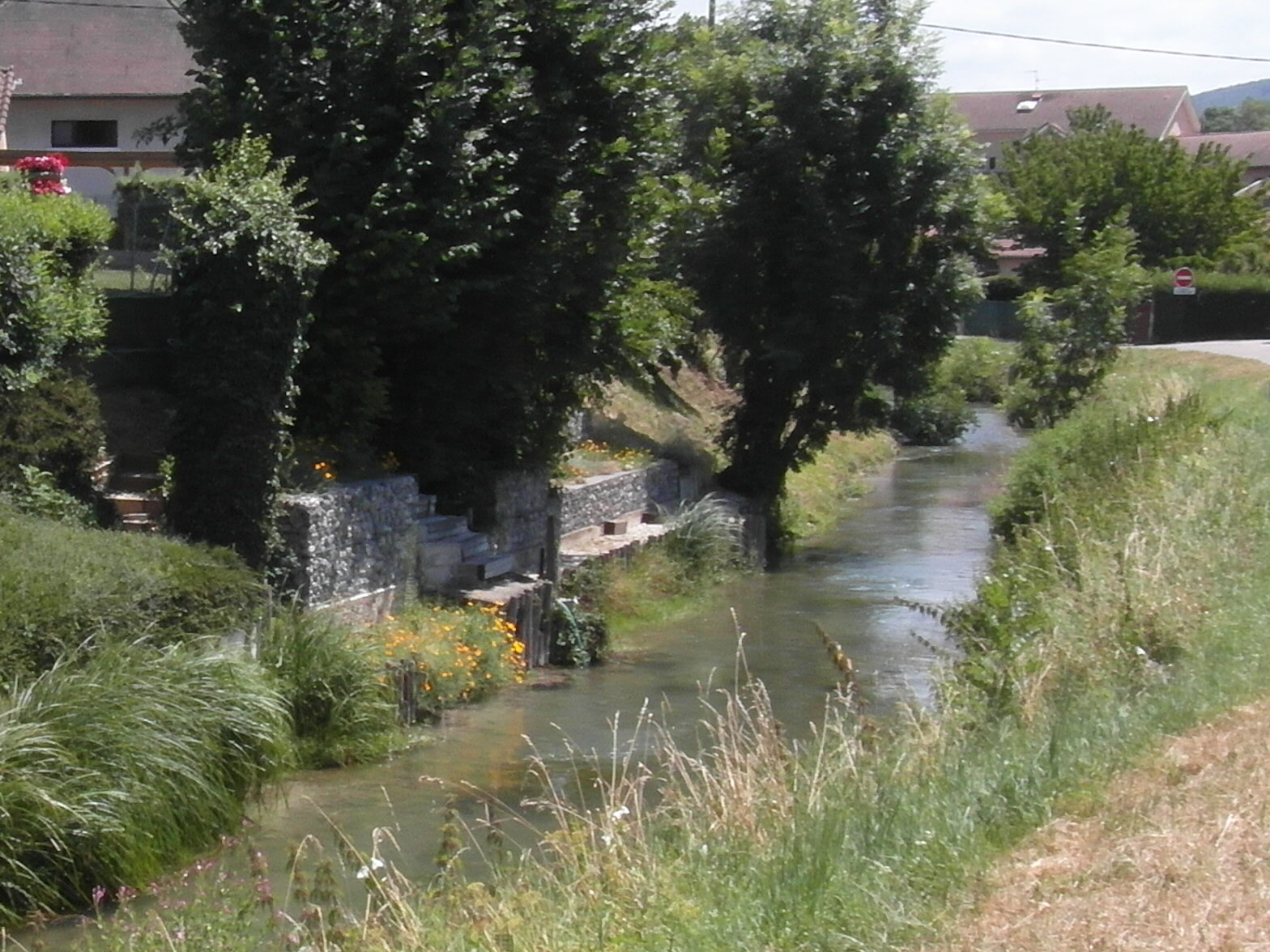 La Fure à Charavines